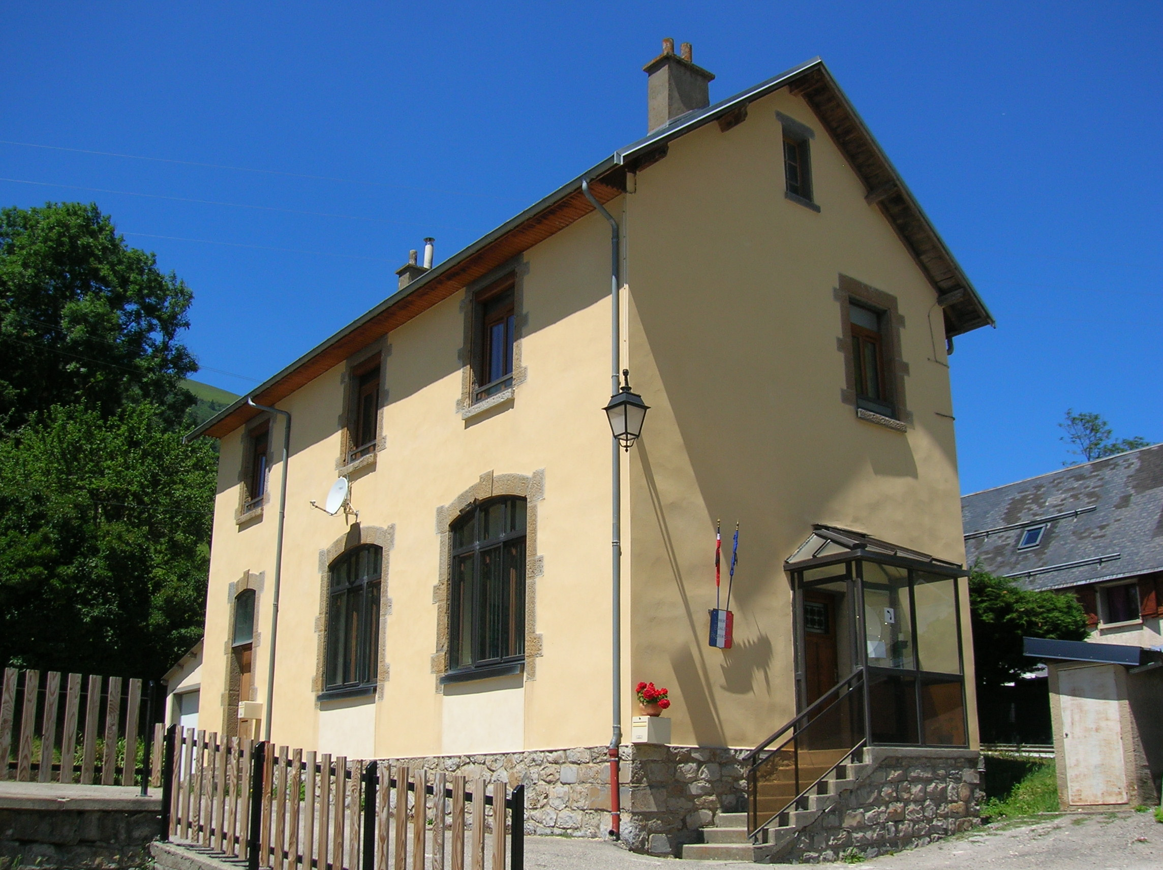 Sainte-Luce, Isère, France.